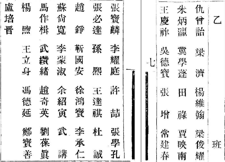 西學專齋學生